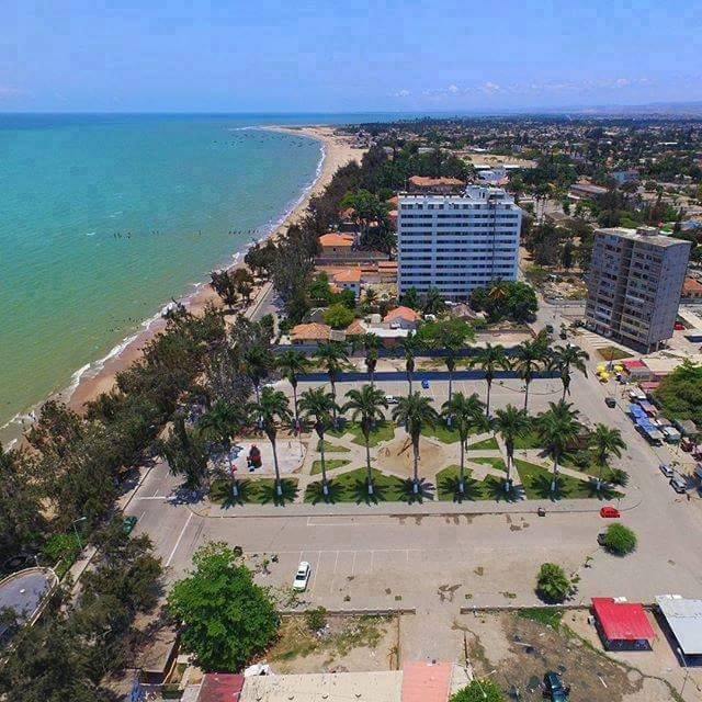 A maravilhosa praia morena